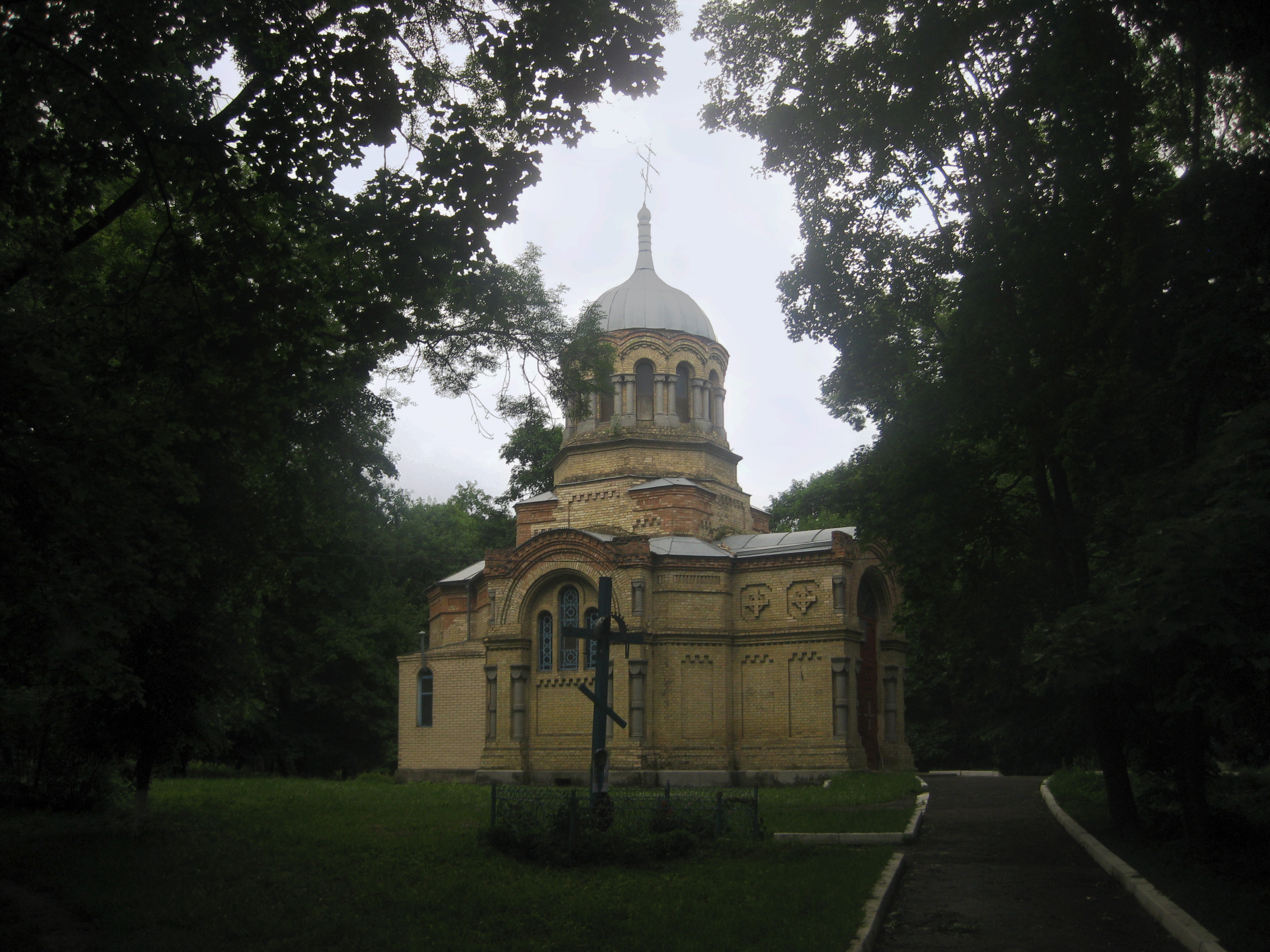 Новочорторийський, Любарський р-н, с. Нова Чортория